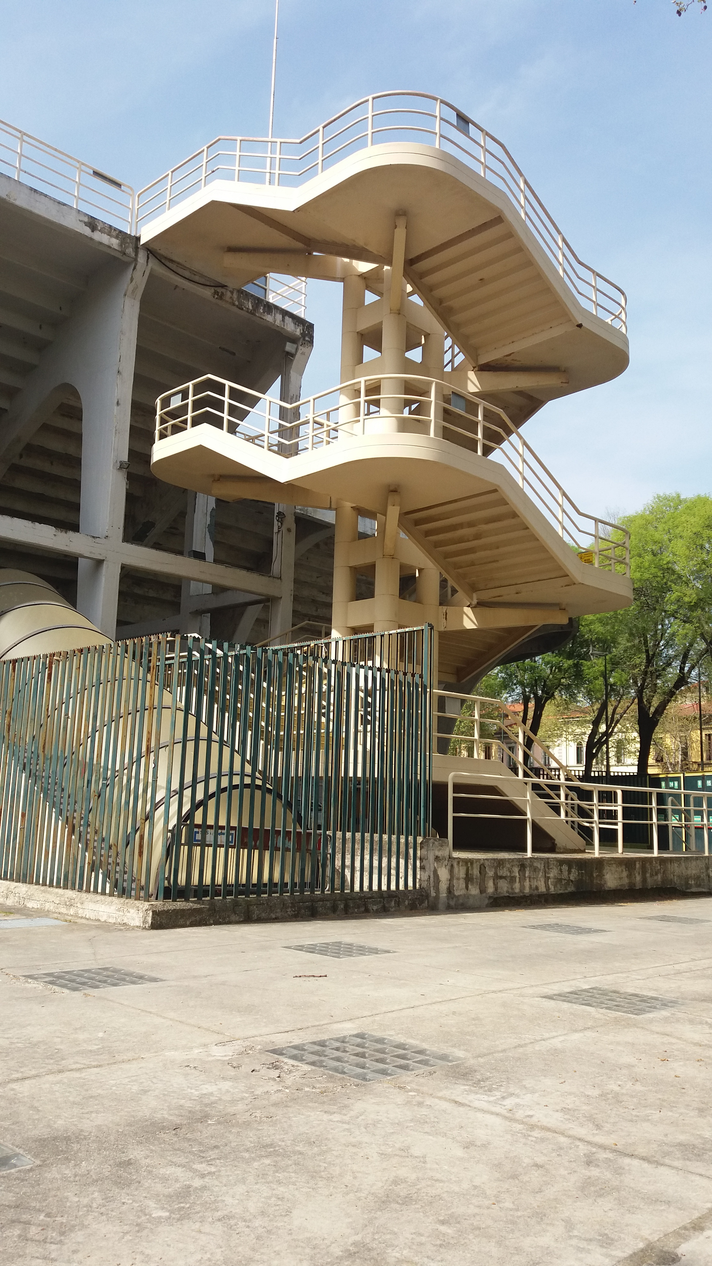 Scala esterna alto nord dello stadio Artemio Franchi di Firenze